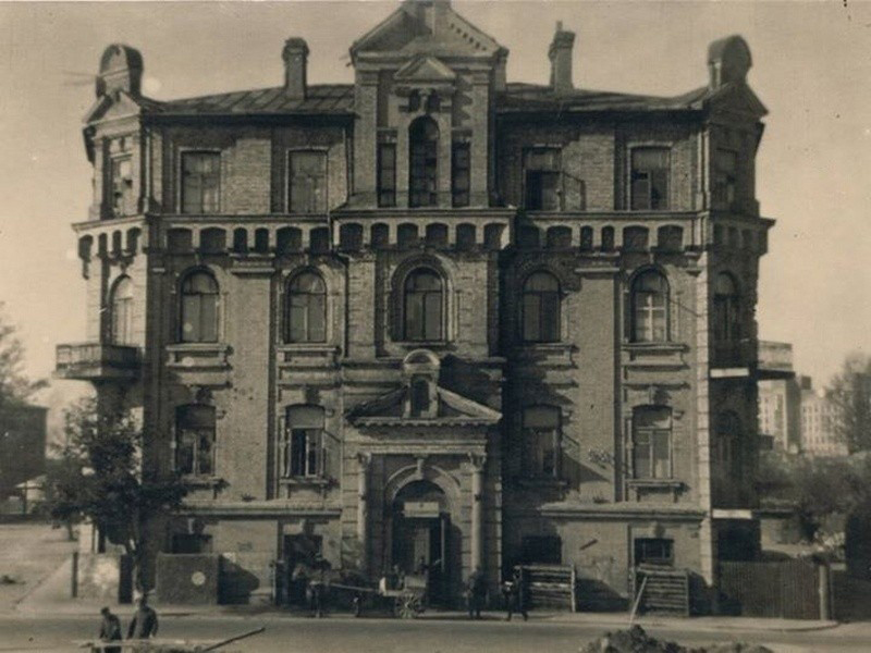 Беларуская (тарашкевіца): Менск (Miensk), вуліца Міхайлаўская (vulica Michajłaŭskaja). Гімназія Рэймана